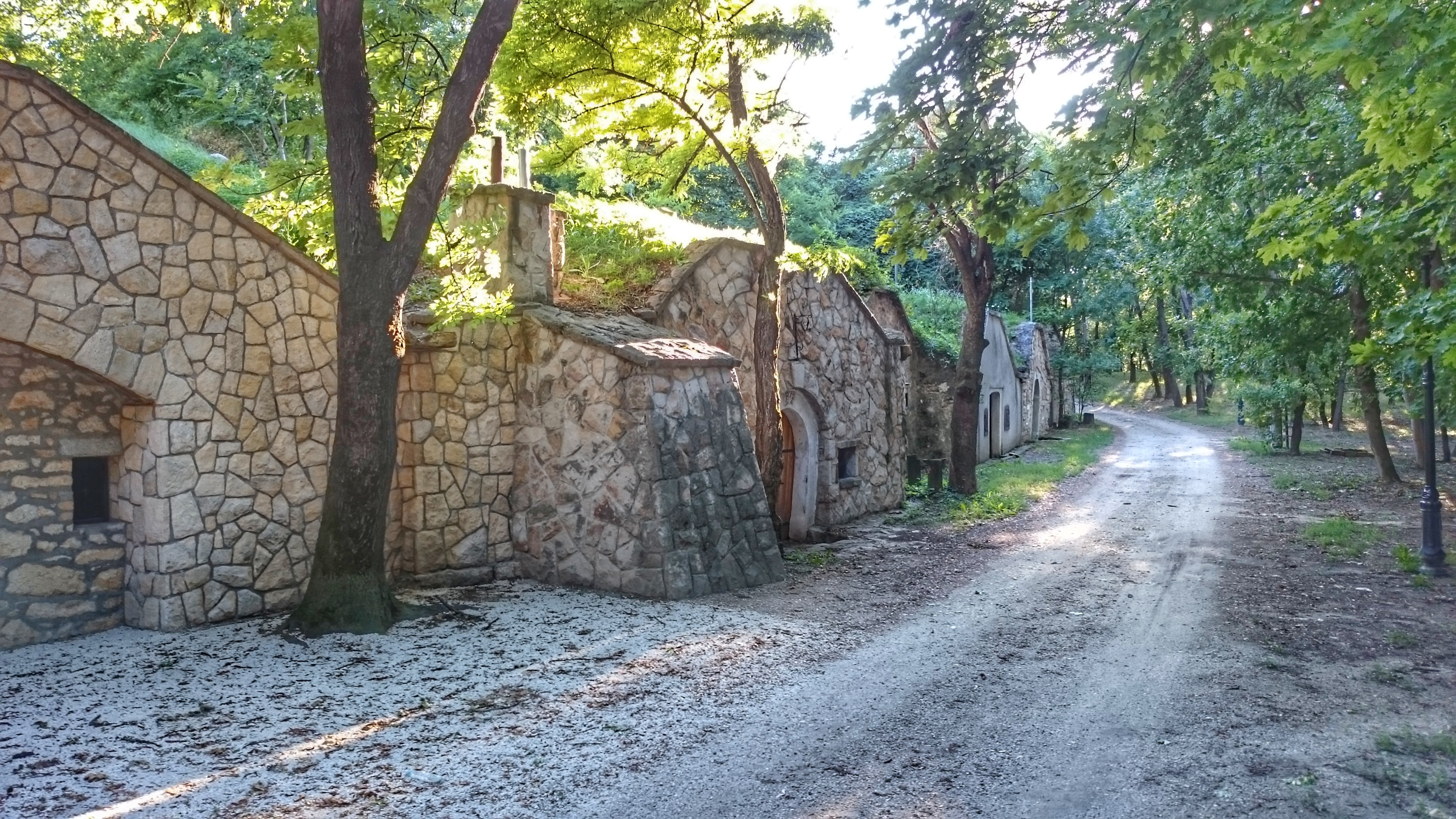 Páty Pincehegy